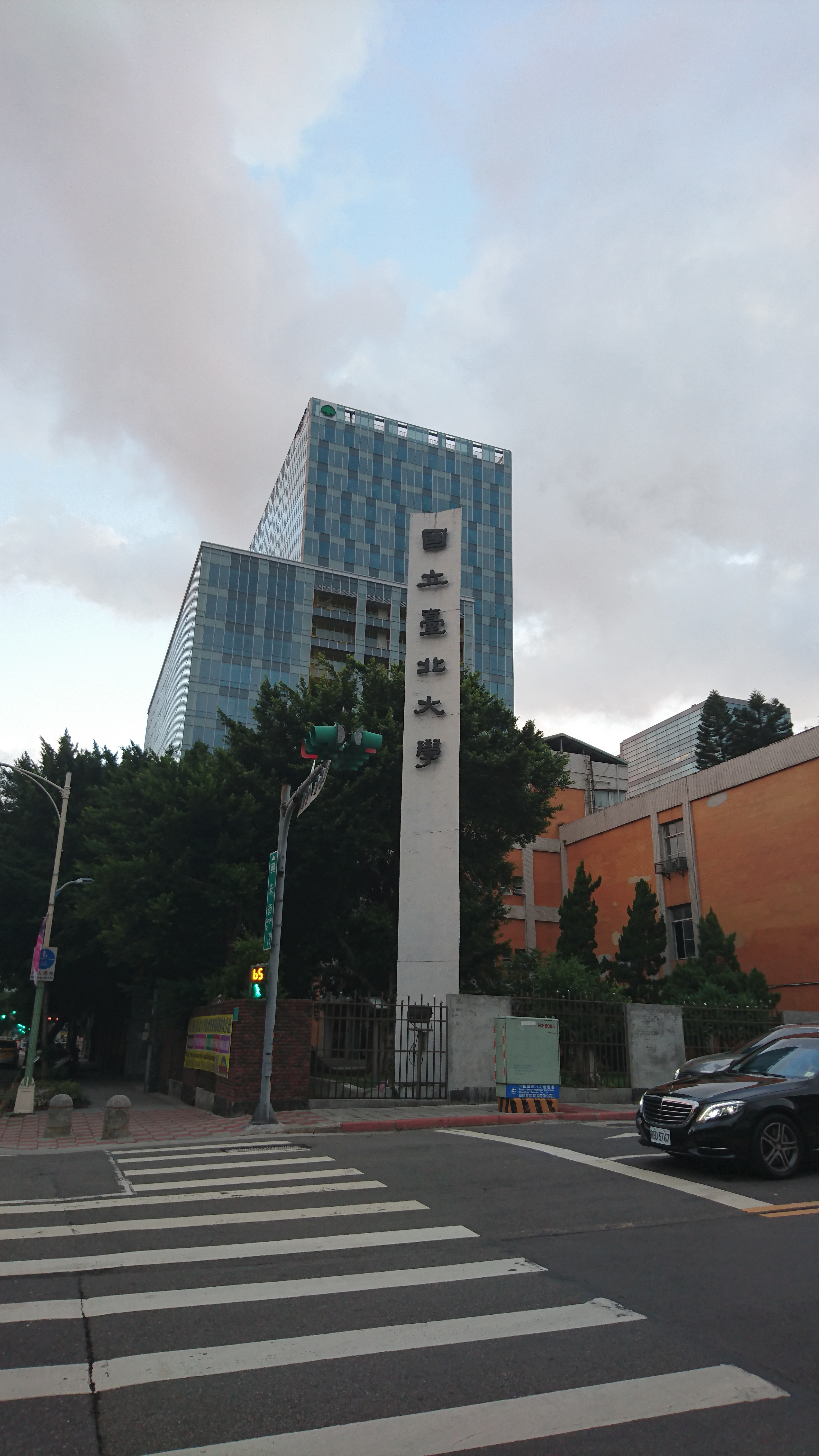 中文（台灣）: 建國合江校區牌樓